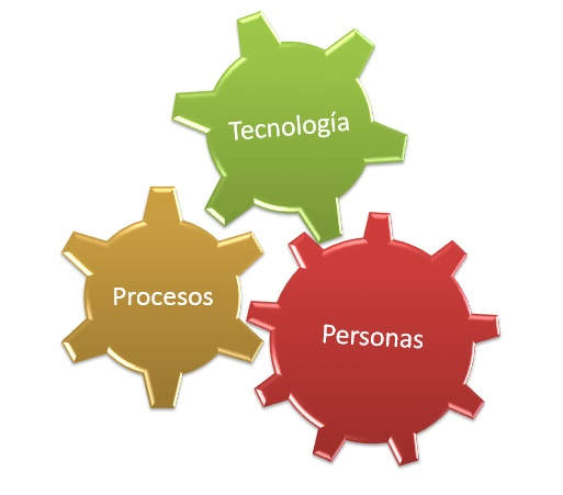 Tres elementos de la Gestión de servicios de TI